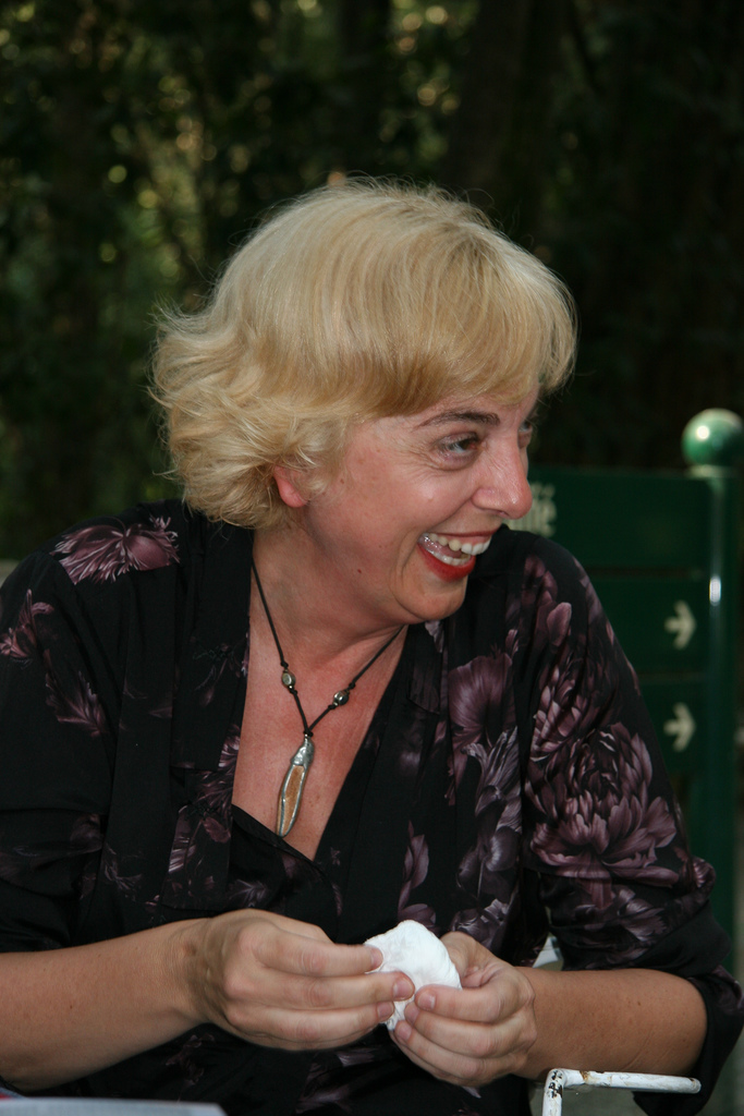 L'attrice televisiva italiana Katia Beni